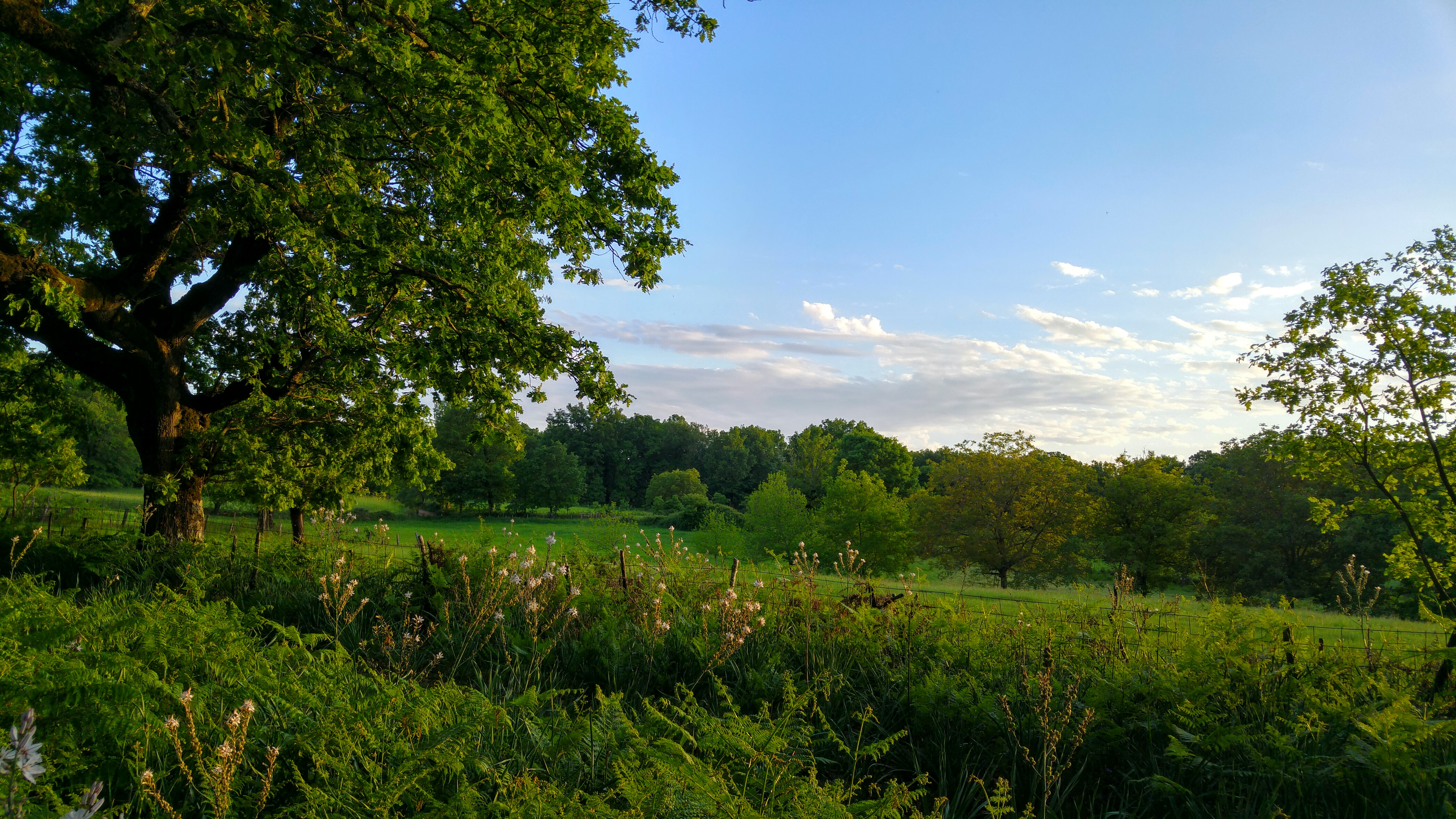 Δρυοδάσος Φολόης, Μάιος 2016 This is a photography of Natura 2000 protected area with ID GR2330002